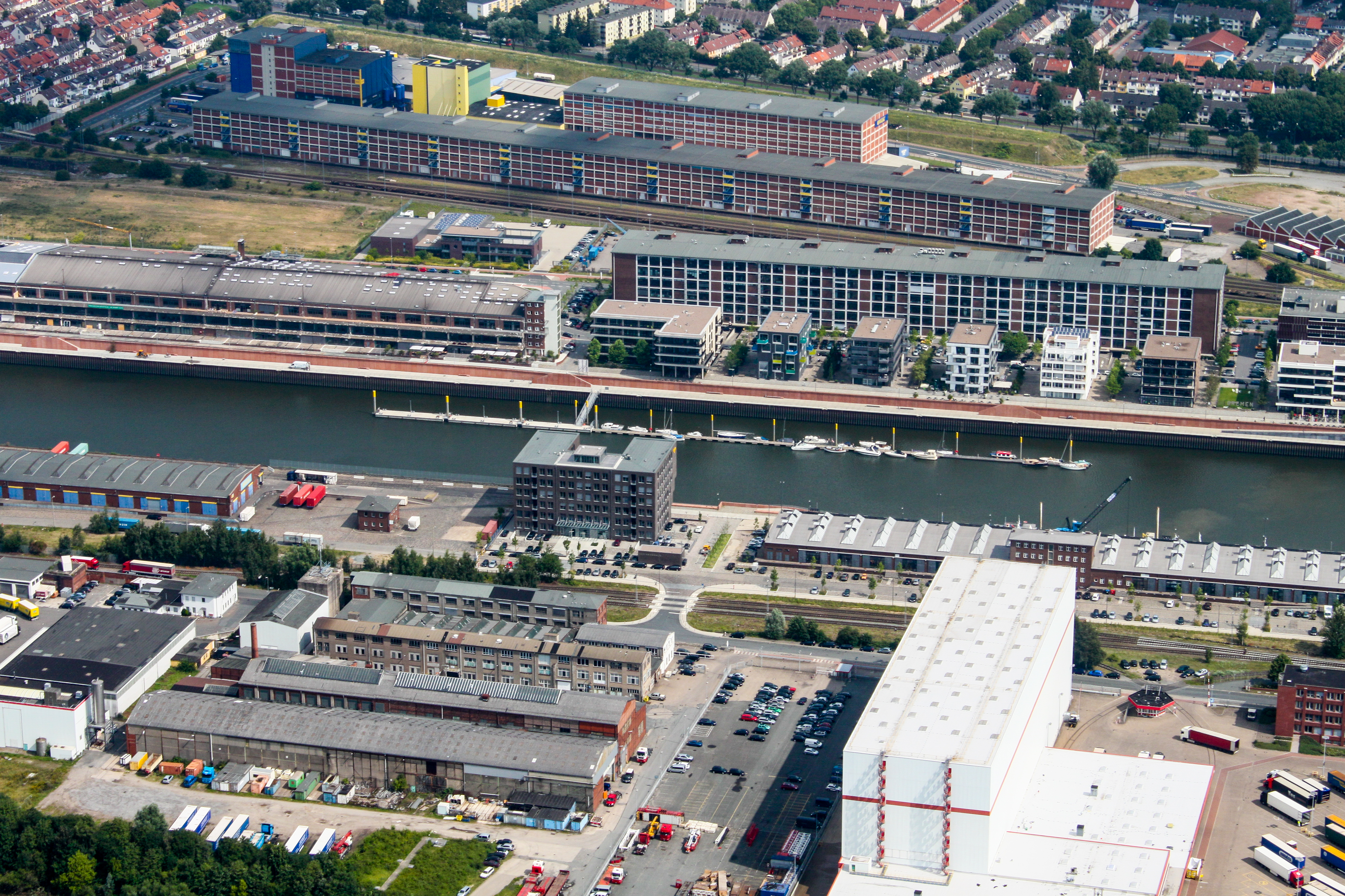 Lufbilder Bremen: Häfen, JVA Oslebshausen, Ohlendorf, Lindenhof, Überseestadt, Becks, Kellogs, St. Stephanis Kirche, Hauptbahnhof, Weser (identische Bildbeschreibung für File:2012-08-08-fotoflug-bremen zweiter flug 1142.JPG bis File:2012-08-08-fotoflug-bremen zweiter flug 1244.JPG; alle mit GPS-Koordinaten